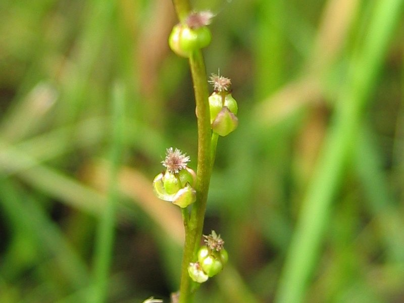 Sumpf-Dreizack Triglochin palustre, Zingst